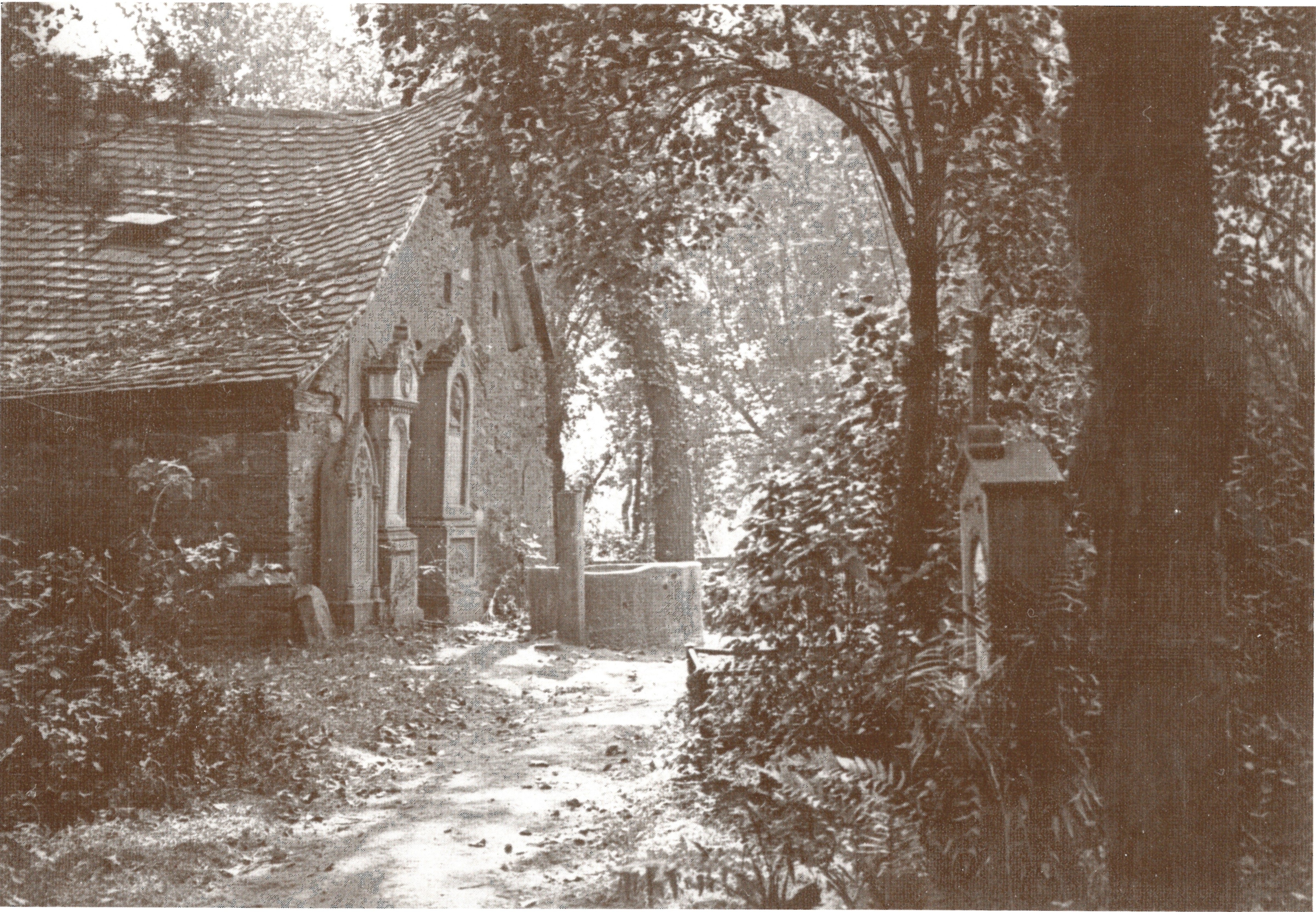 Schweinfurt Fotografie vor 1874: ehemaliger Klostergarten Karmelitenkloster Schweinfurt, zum Leichenhof nach 1560 umgewandelt